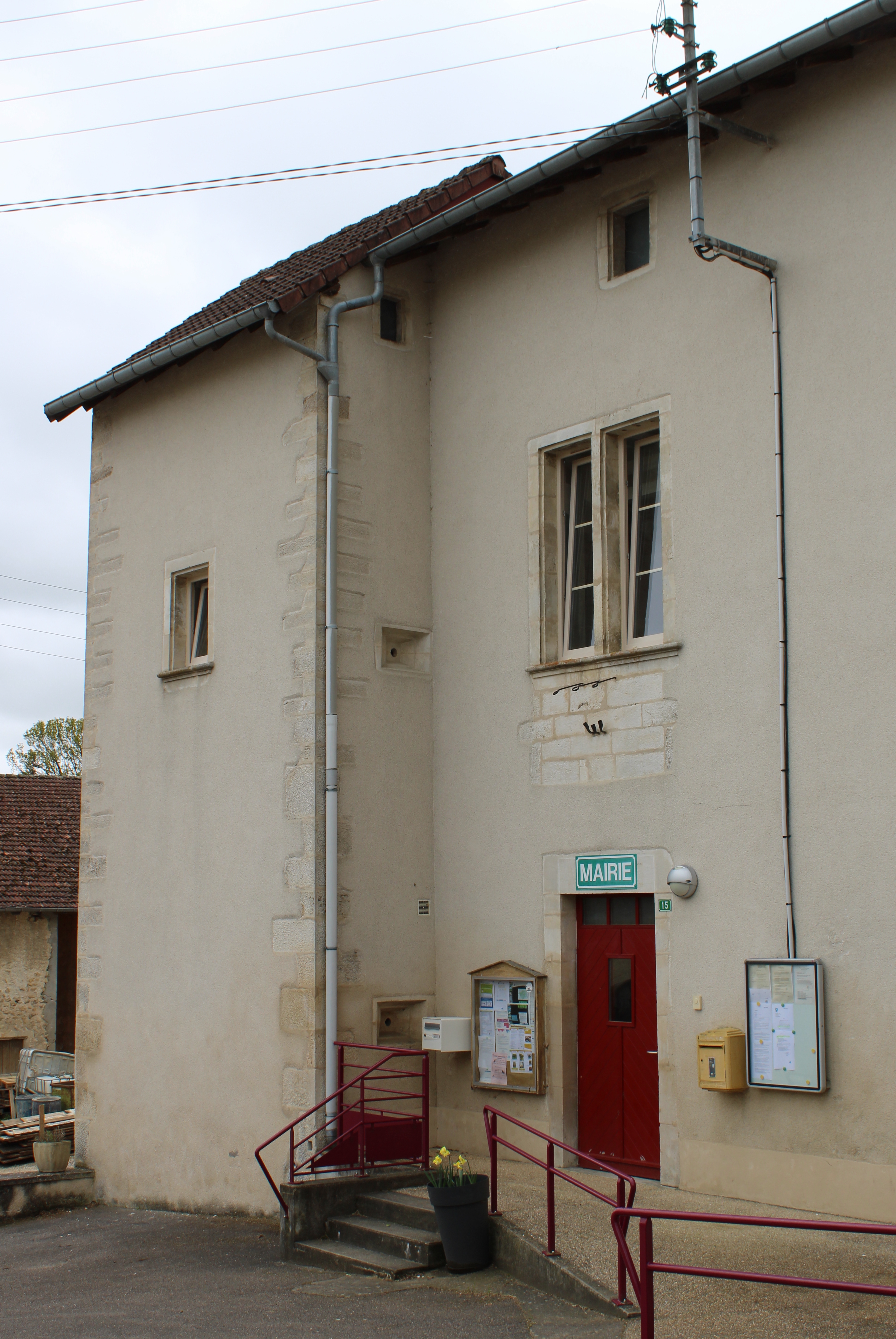 La mairie